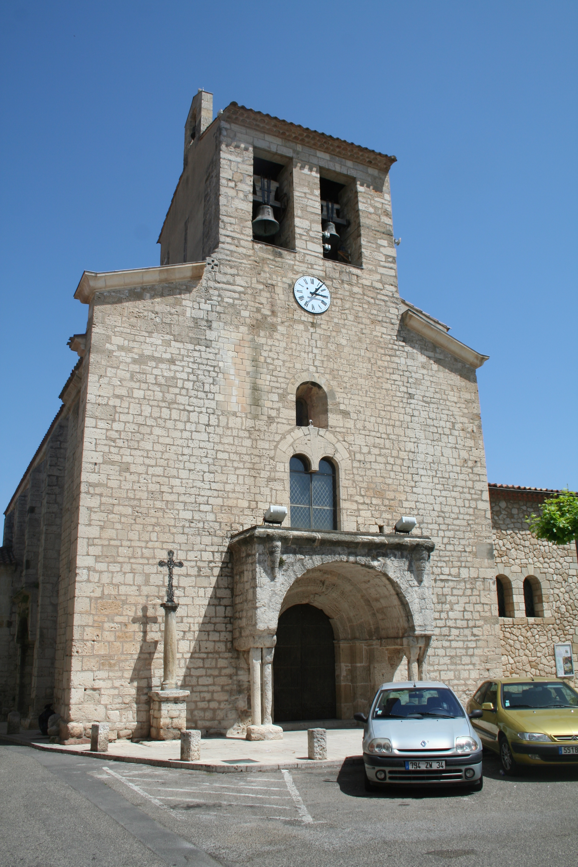 Magalas (Hérault) - façade de l'église Saint-Laurent